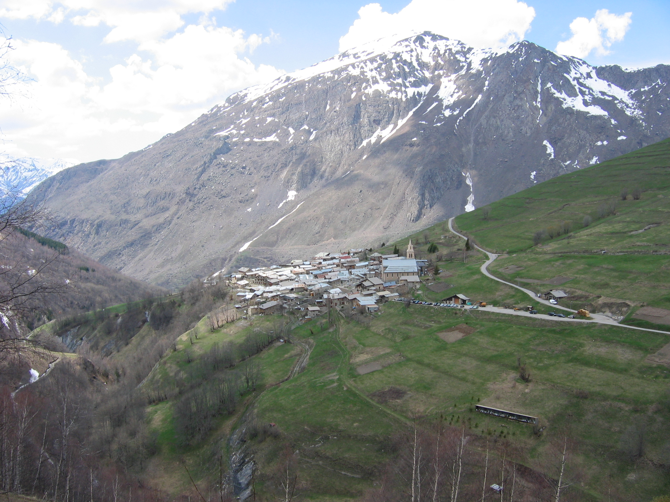 Besse-en-Oisans